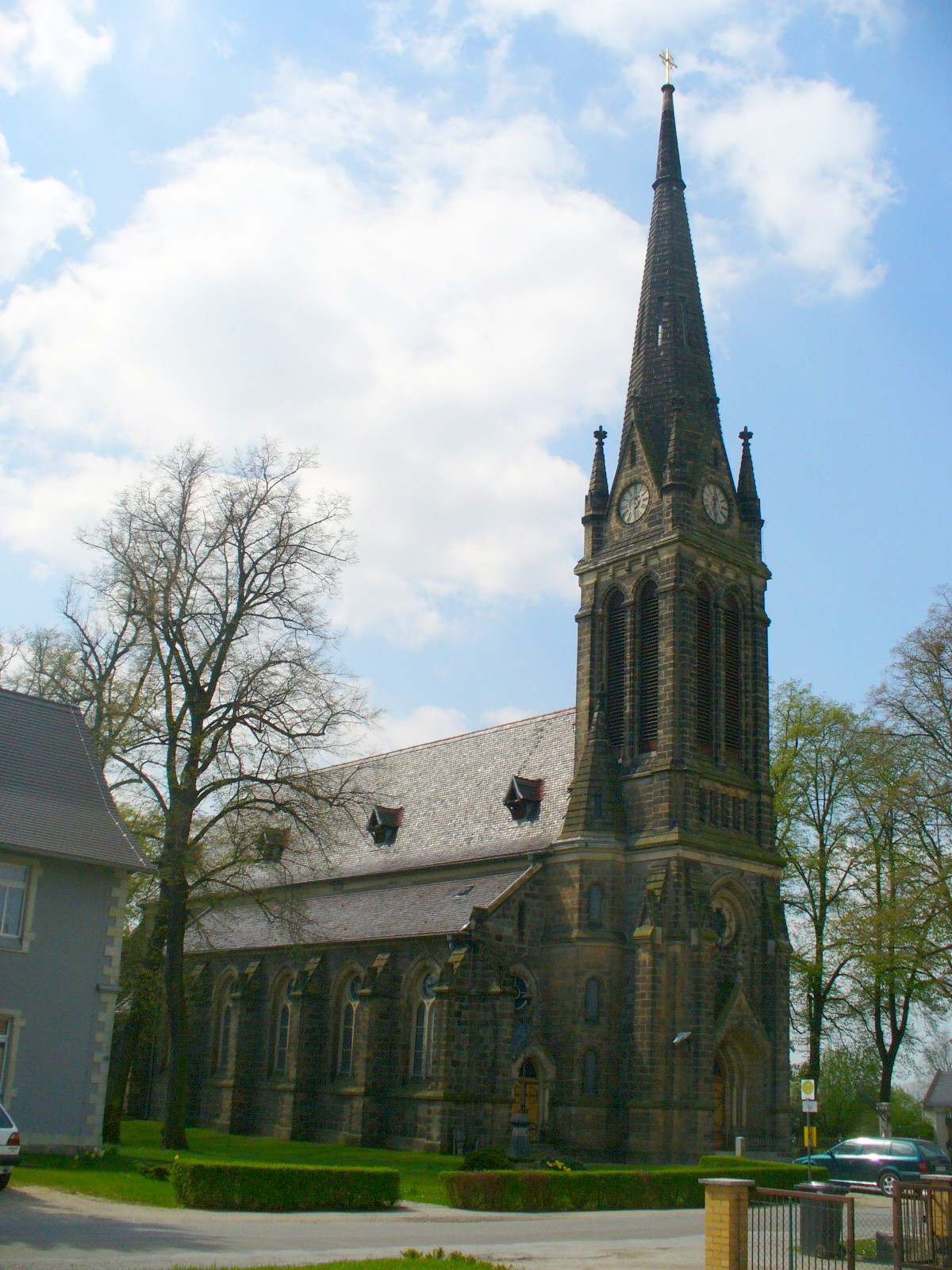 Katholische Herz-Jesu-Kirche zu Storcha. Neugotisch, Grundsteinlegung 1882, Weihe am 19. Juni 1887. Länge 37m, Breite 15m, Turmhöhe 45m. Nord-Ost Ansicht